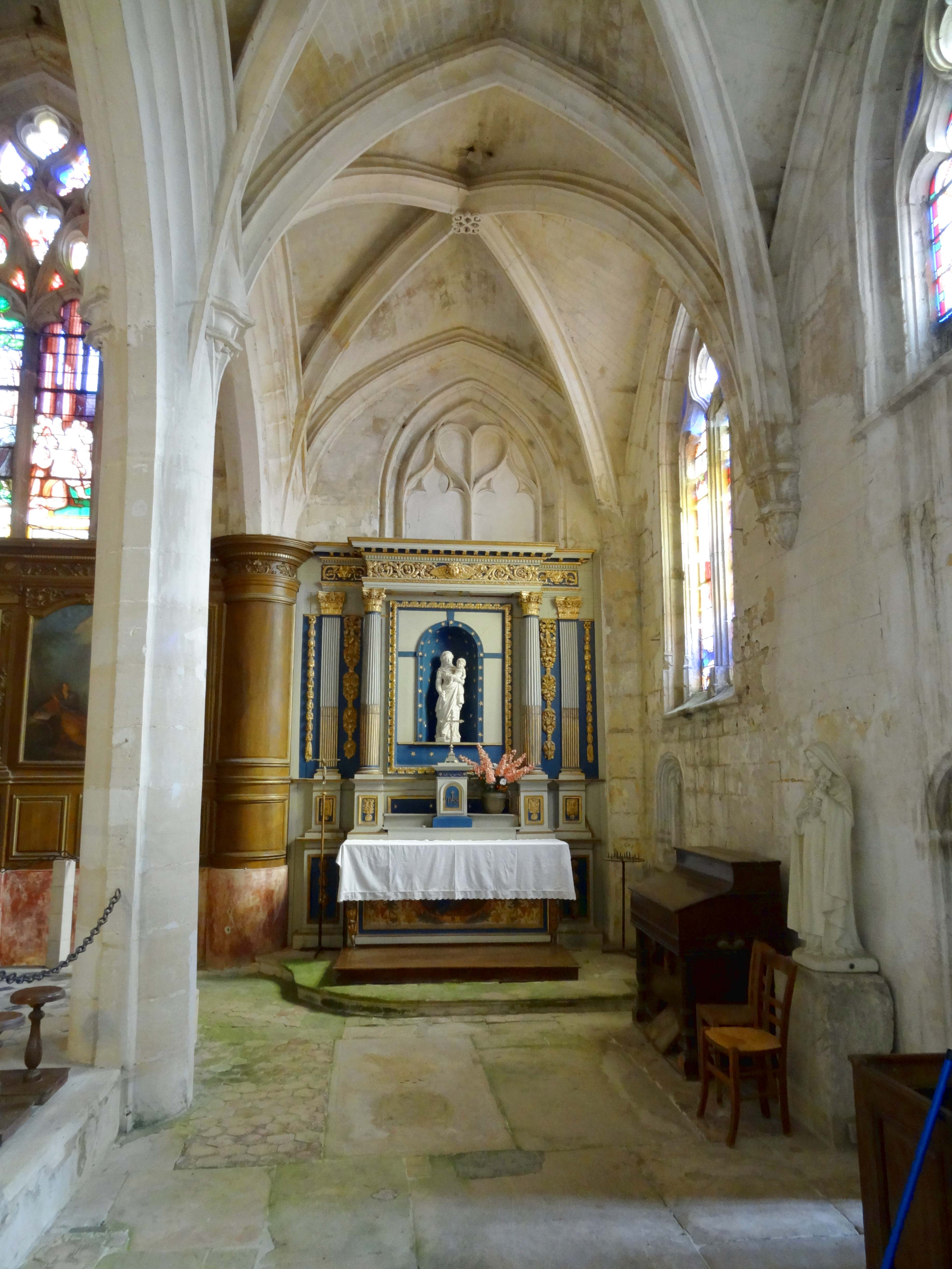 Intérieur de l'église - voir titre.